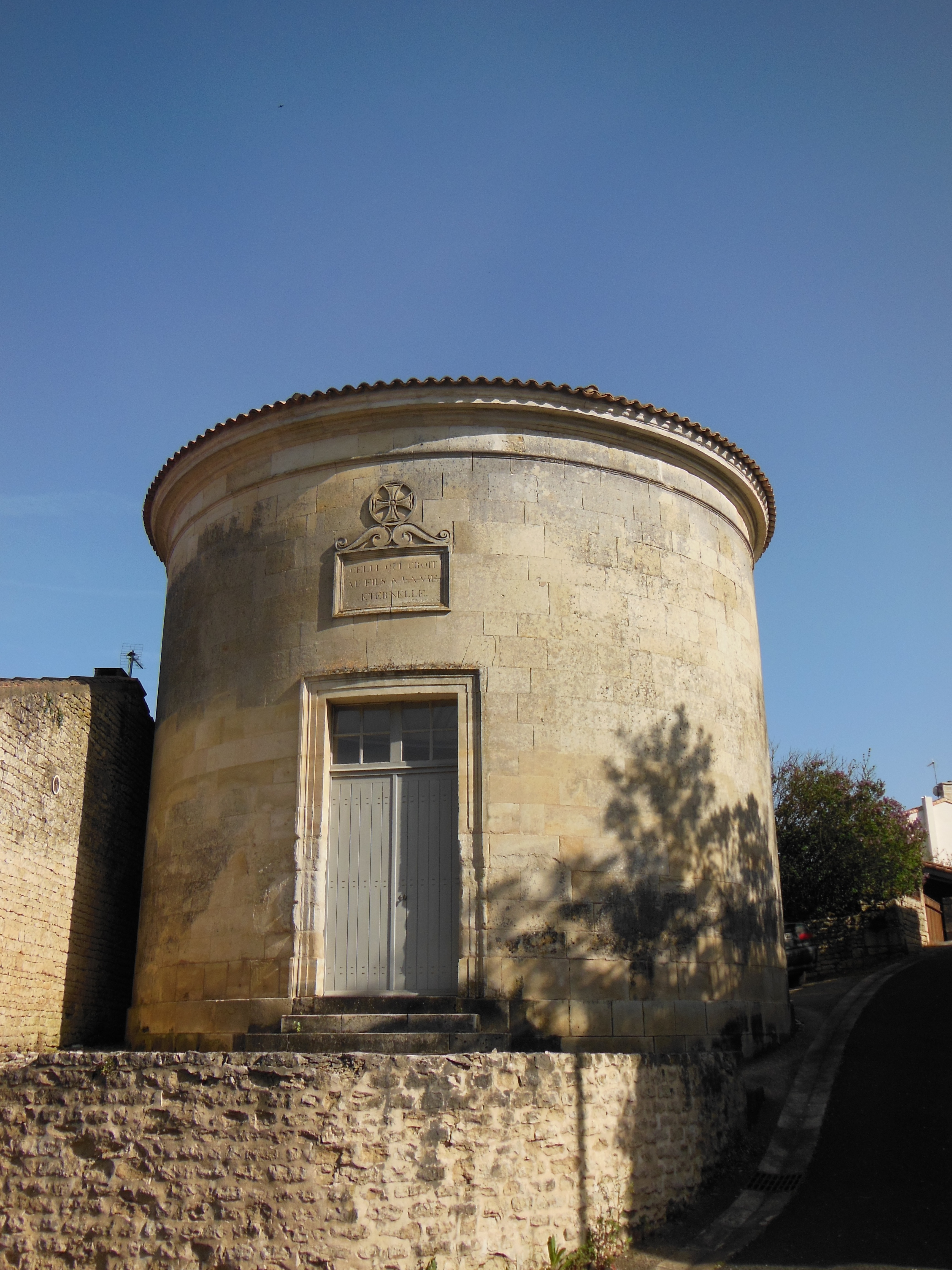 Temple circulaire de Saint-Gelais (79)